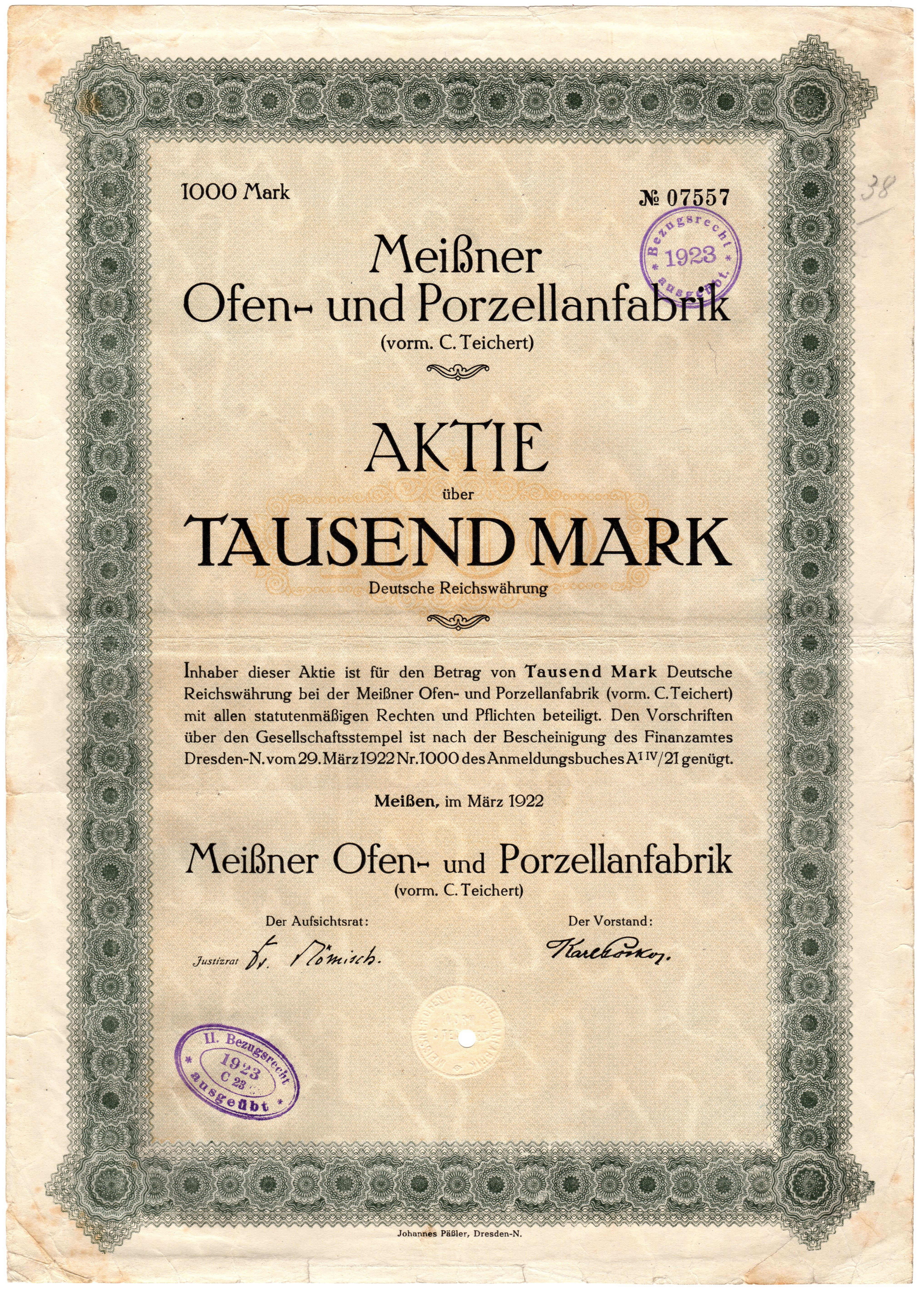 Share of the Meißner Ofen- und Porzellanfabrik (vorm. C. Teichert), issued March 1922